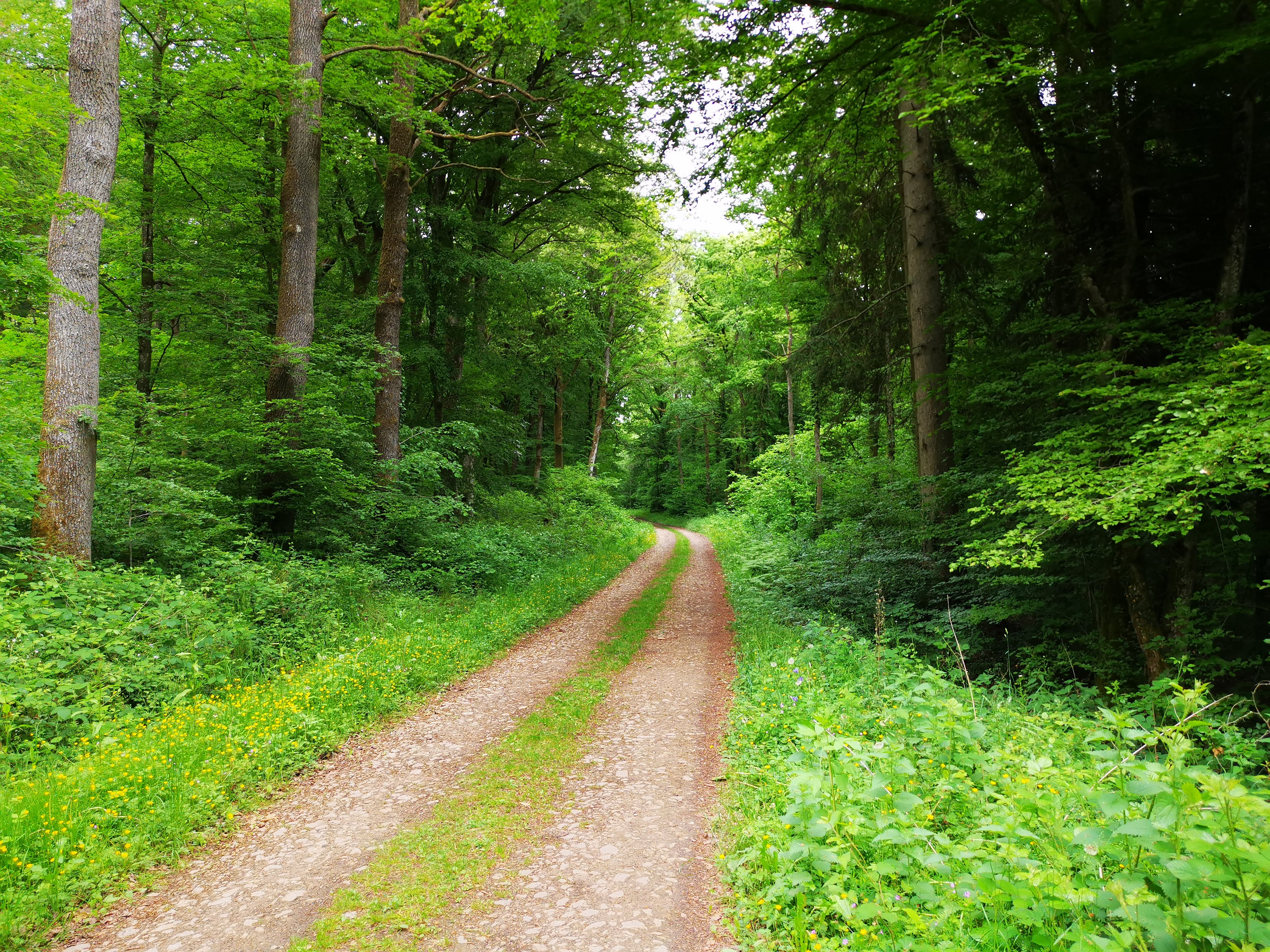 Nommern. Sentier pédestre Feelser Jangli.